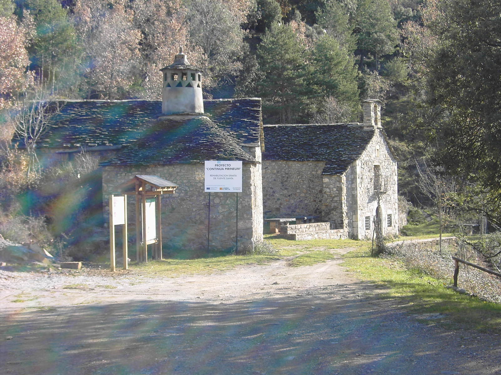 Ermita de la Fuente Santa (Font Santa) en Laspuña, Huesca. Es uno de los lugares místicos más reconocidos de Sobrarbe.